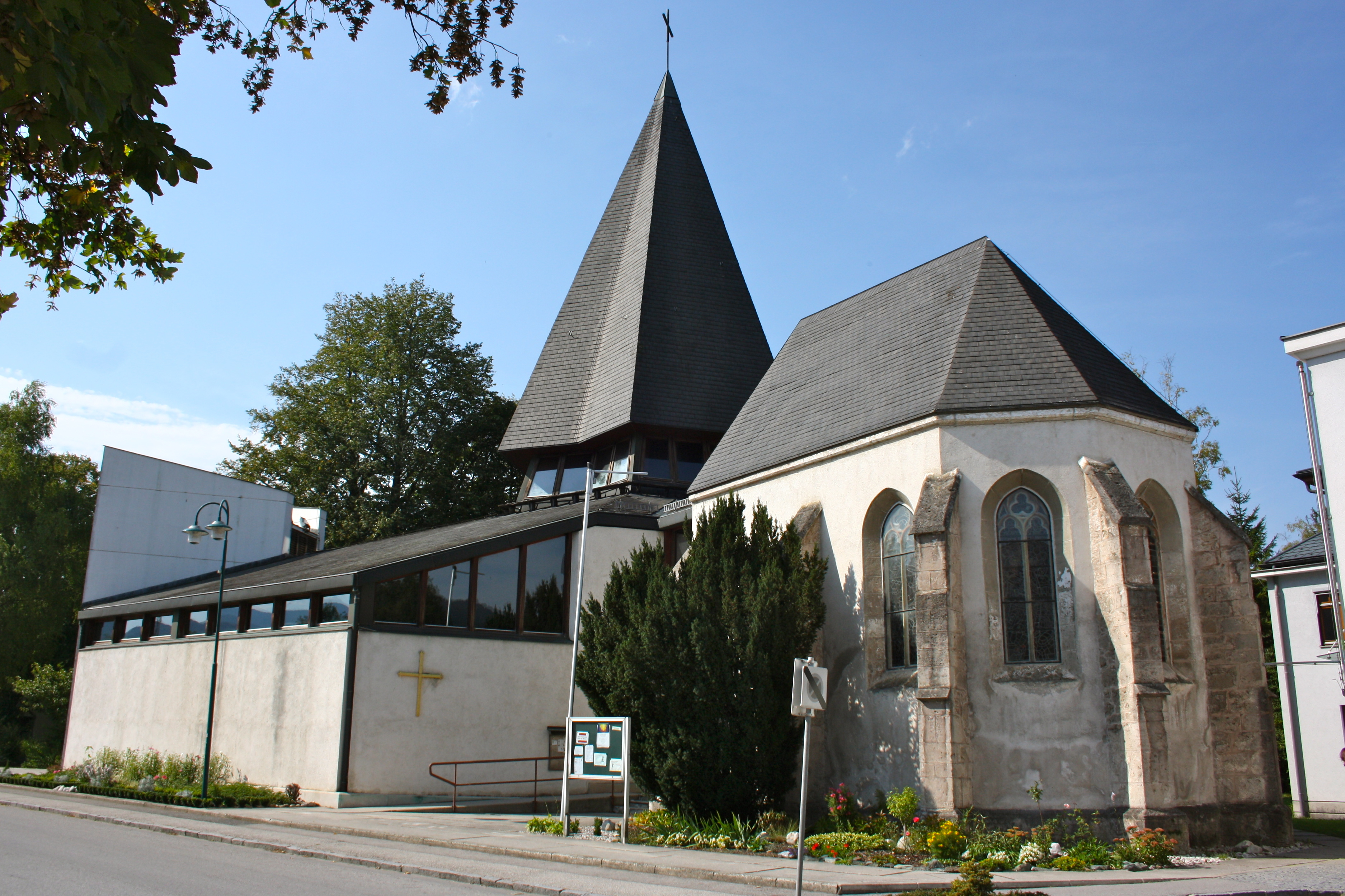 Außenansicht der Pfarrkirche Pernitz.